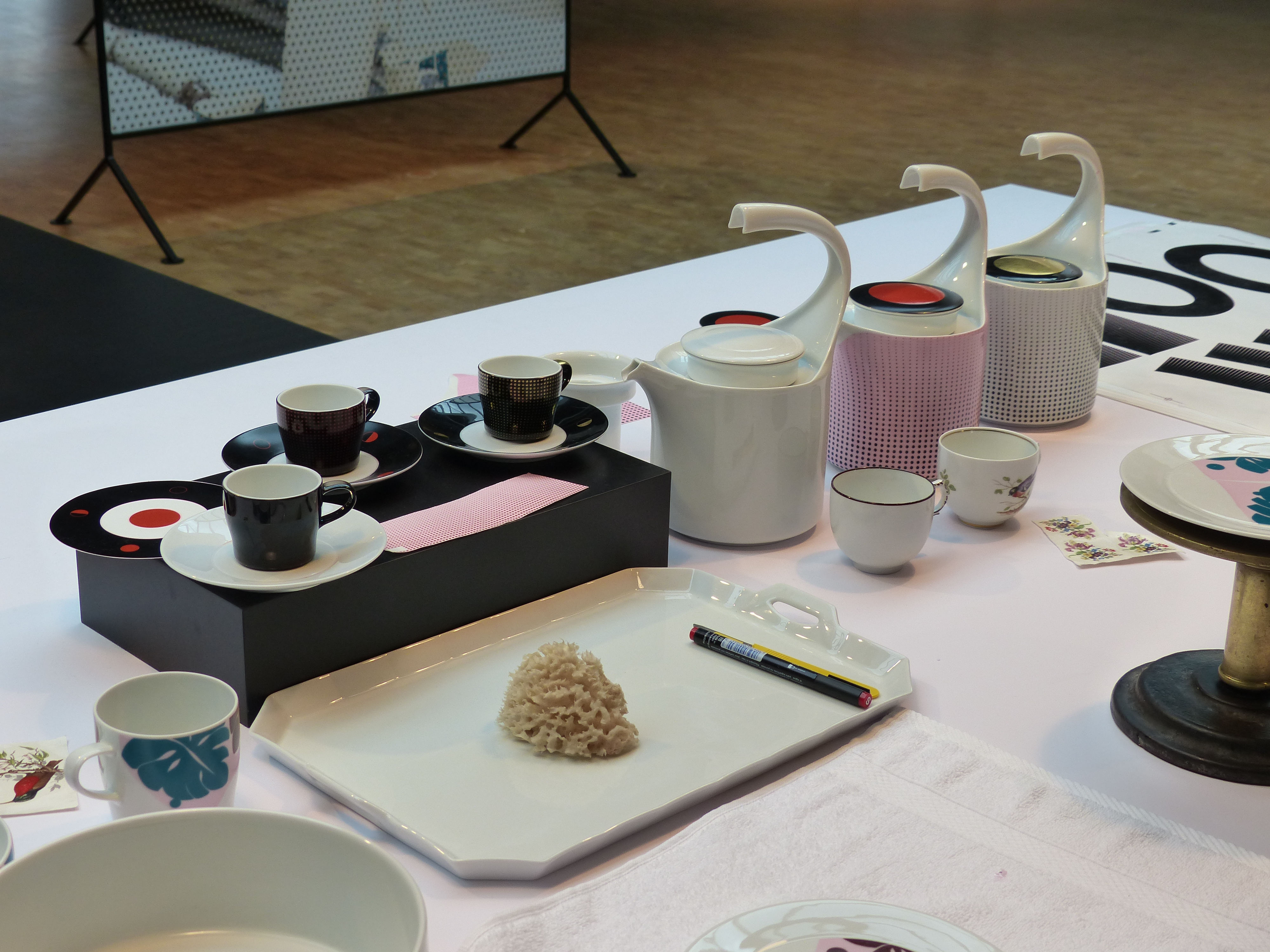 Porzellanmanufaktur Fürstenberg: Schauwerkstatt, Porzellanmalerei, Form Auréole GLAM-on-Tour: Porzellanmanufaktur Fürstenberg Wikipedianer fotografierten vom 6.– 8. Oktober 2017 die Ausstellungstücke im Museum Schloss Fürstenberg, Glasmuseum Boffzen und im Kragstuhlmuseum. This photo was taken during a project supported by WMDE Gefördert von / Supported by: Wikimedia Deutschland, Museum Schloss Fürstenberg, Glasmuseum Boffzen und Kragstuhlmuseum Für das Museum Schloss Fürstenberg: This work is free and may be used by anyone for any purpose. If you wish to use this content, you do not need to request permission as long as you follow any licensing requirements mentioned on this page.